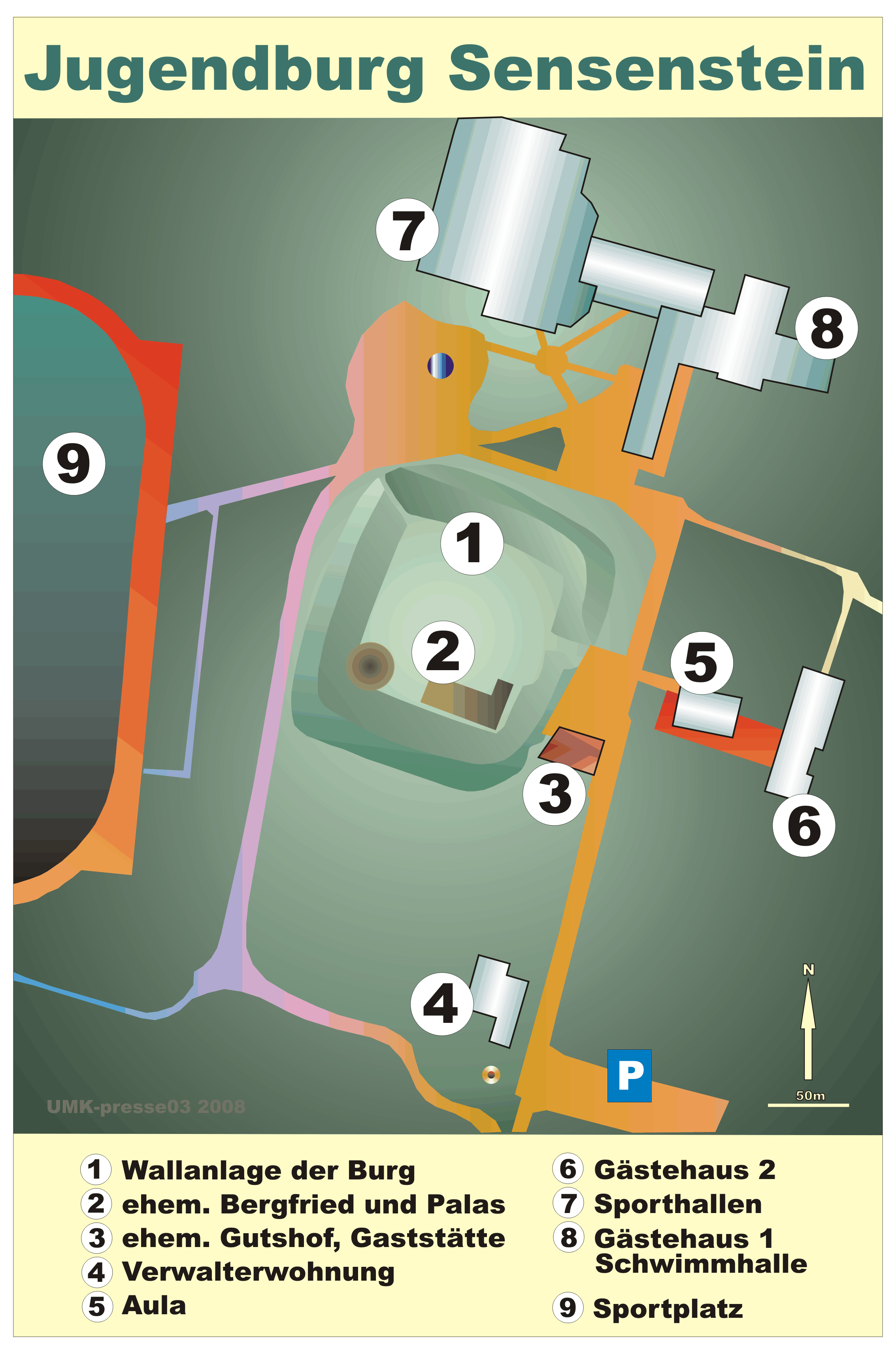 Lageplan der ehemaligen Burg Sensenstein im Areal der heutigen Jugendburg Sensenstein, Niestetal, Kreis Kassel